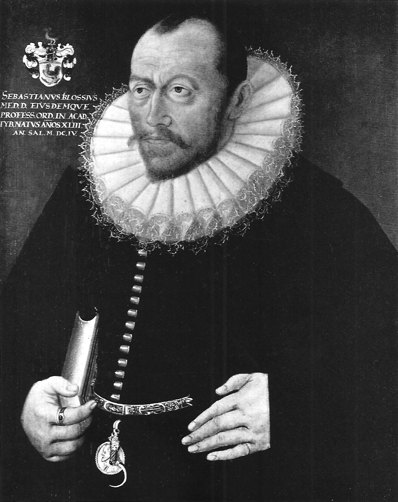 Prof. Sebastian Bloss (Ölbildnis in der Tübinger Professorengalerie)